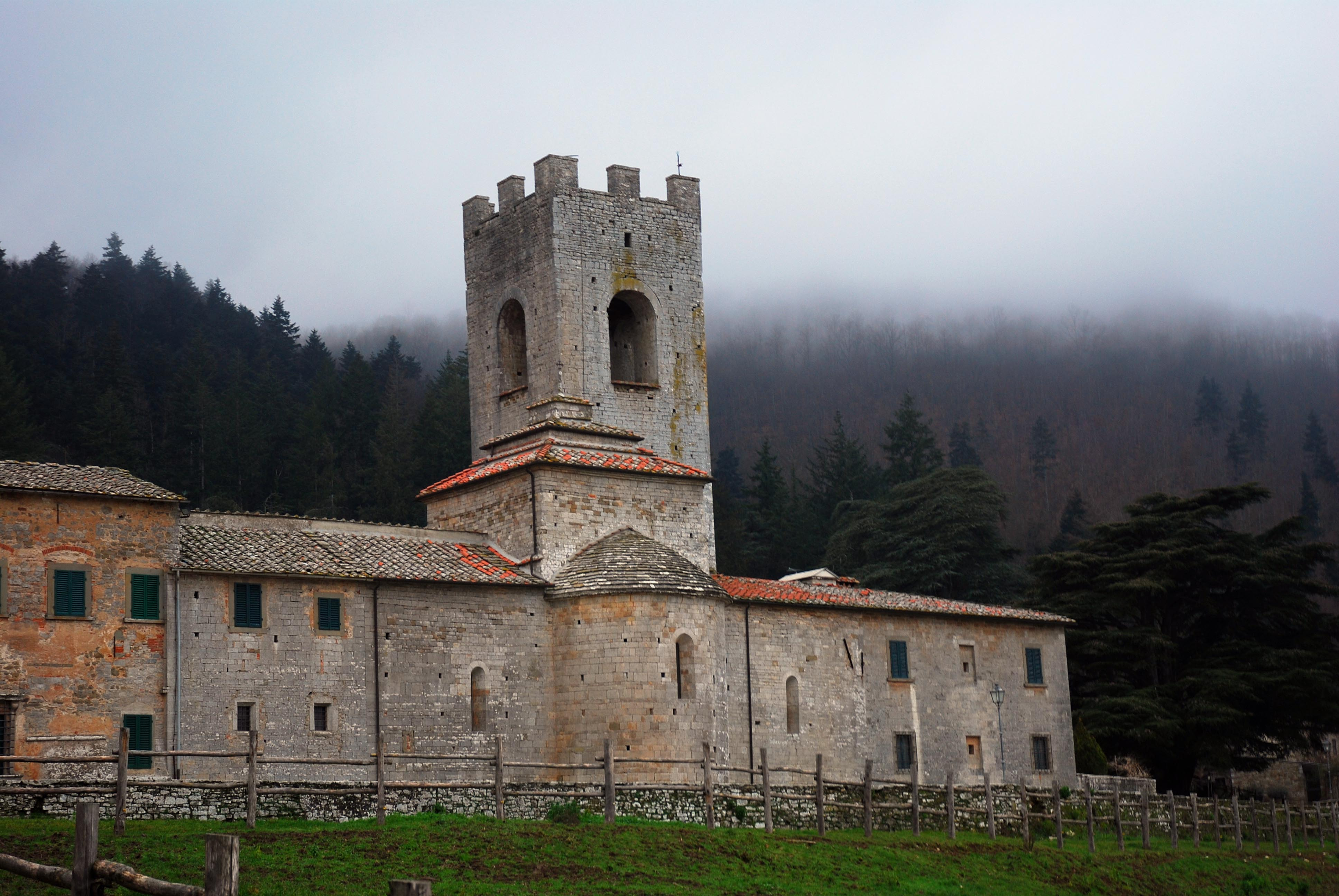 Vista posteriore della Badia a coltibuono